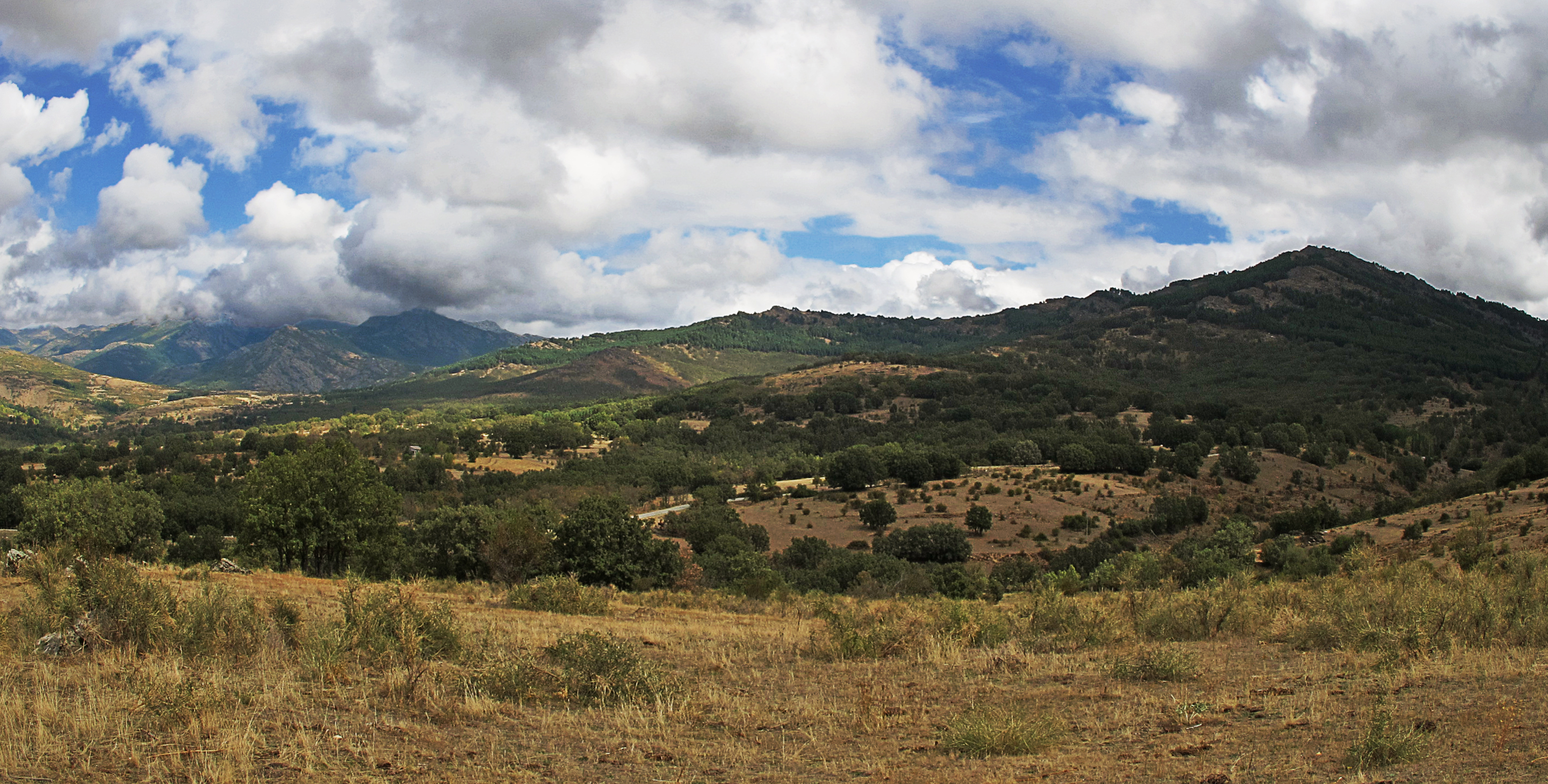 Sierra de Ayllón, Montejo de la Sierra, Madrid.